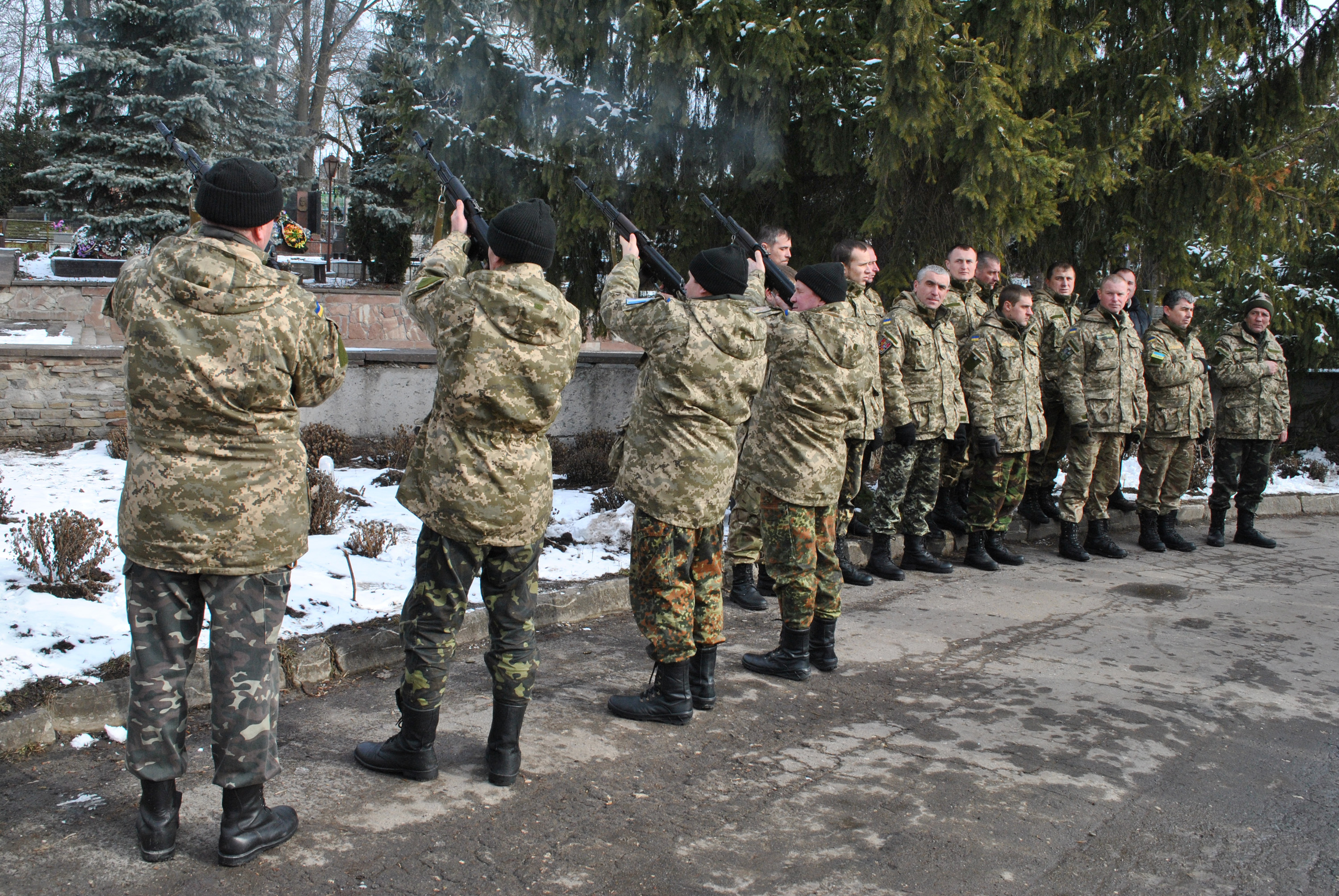 Військовий салют на похороні військовослужбовця 6-го БТО Тернопільської області «Збруч», уродженця м. Тернополя Назарія Сикліцького на Микулинецькому цвинтарі 6 лютого 2015 року.